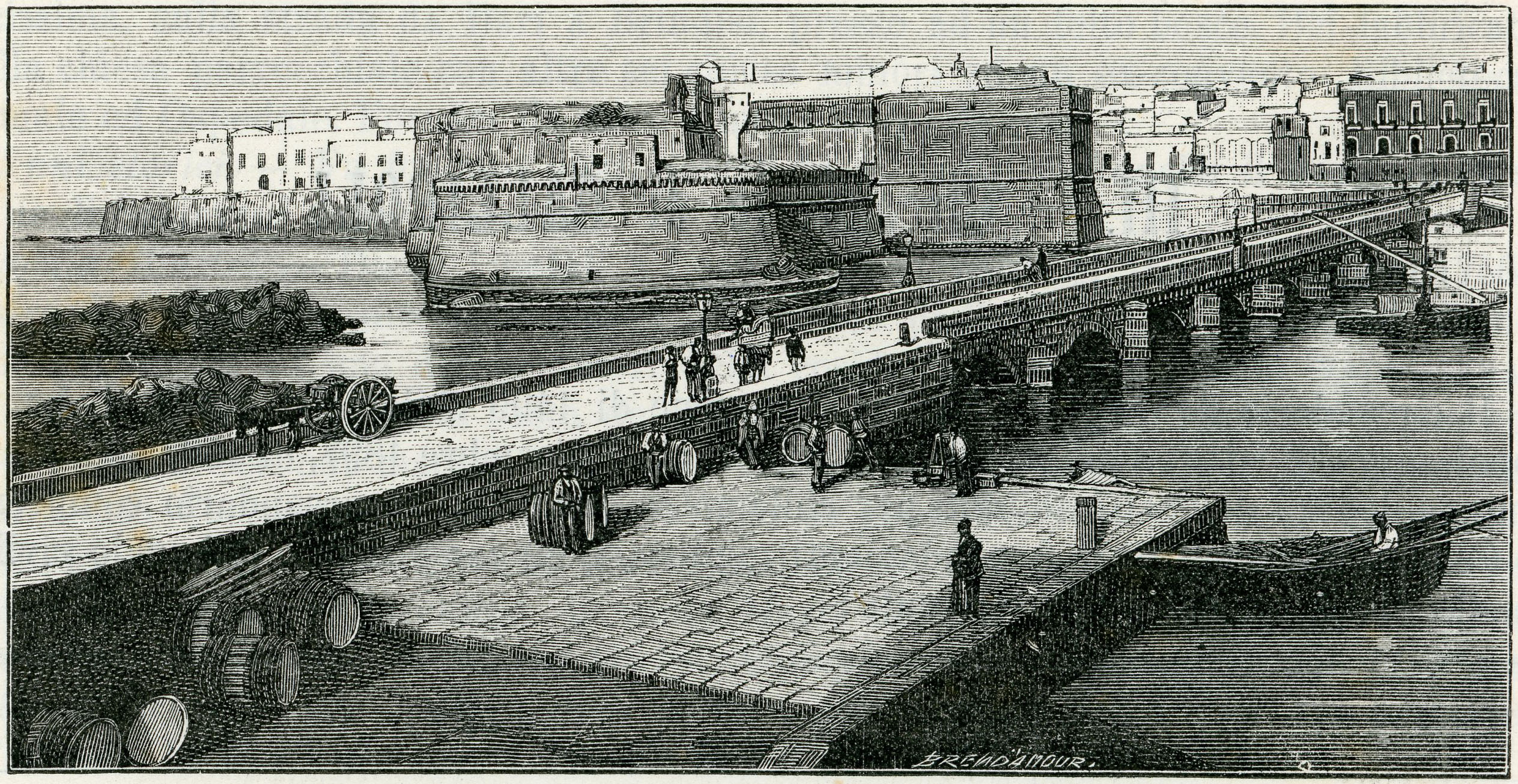 Gallipoli: veduta del castello e del ponte, (xilografia di Richard Brend'amour).